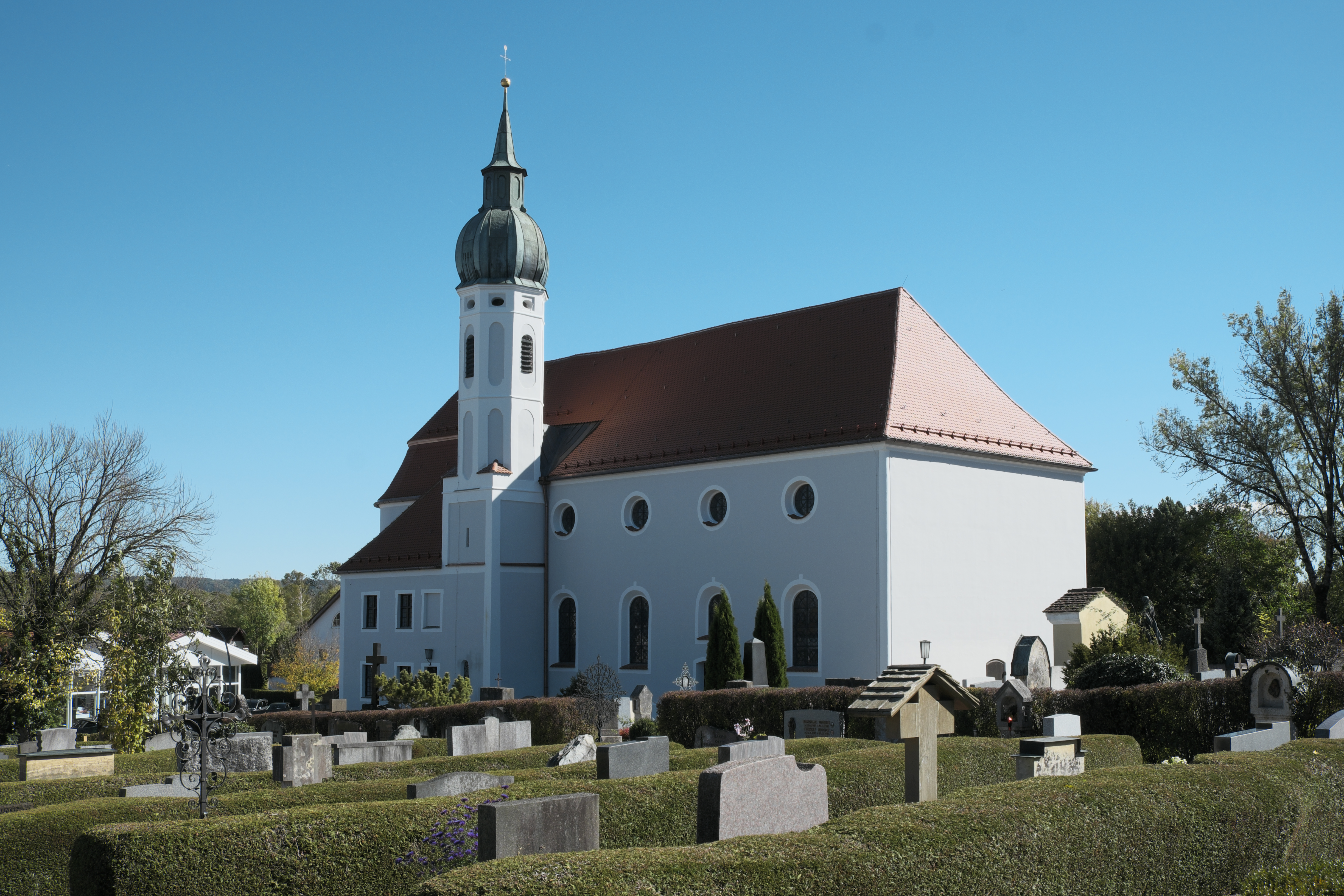 Katholische Friedhofskirche St. Johann in Dießen am Ammersee im Landkreis Landsberg am Lech (Bayern/Deutschland)